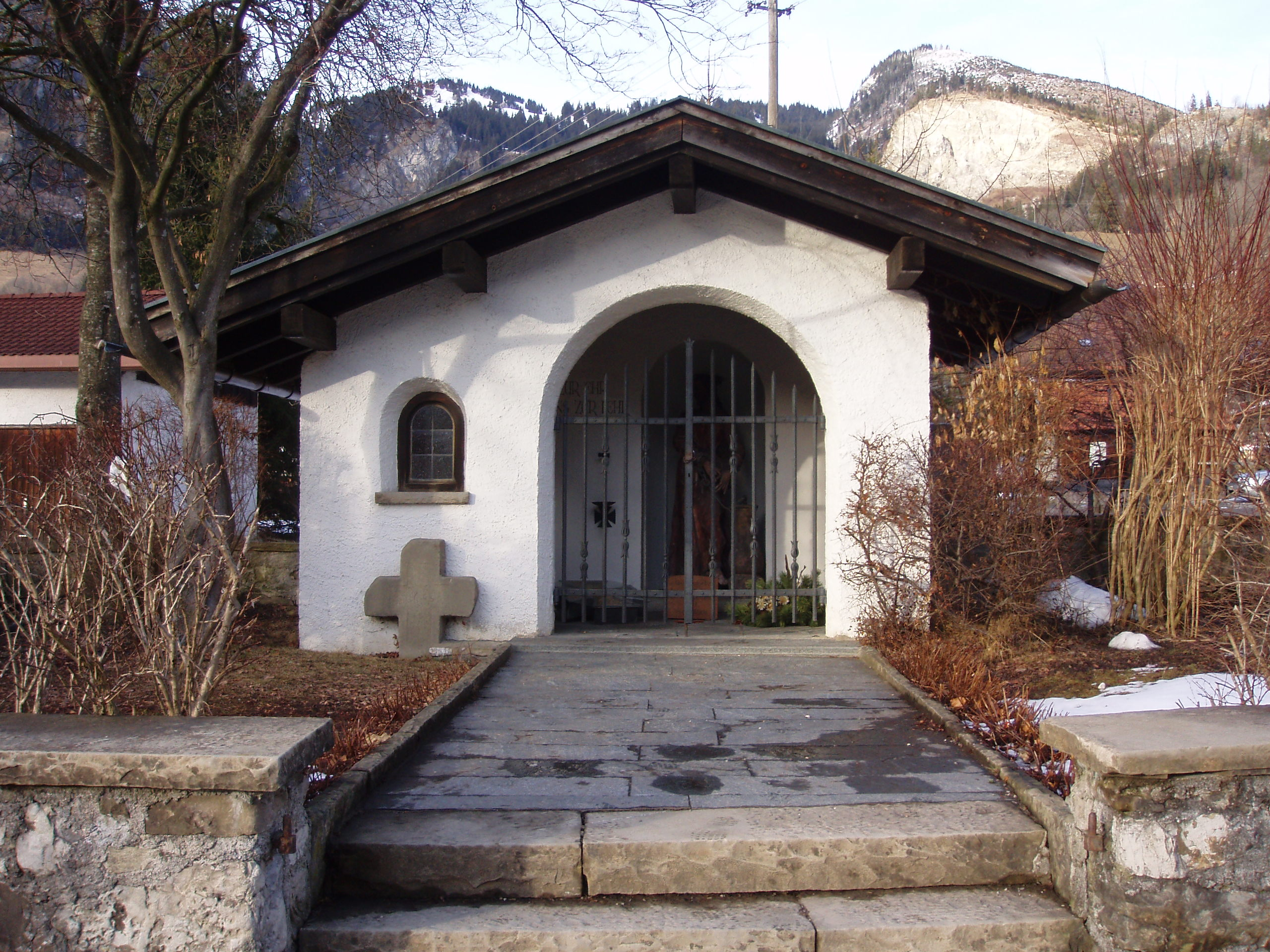 Kriegergedenkkapelle und altes Sühnekreuz in Bad Oberdorf